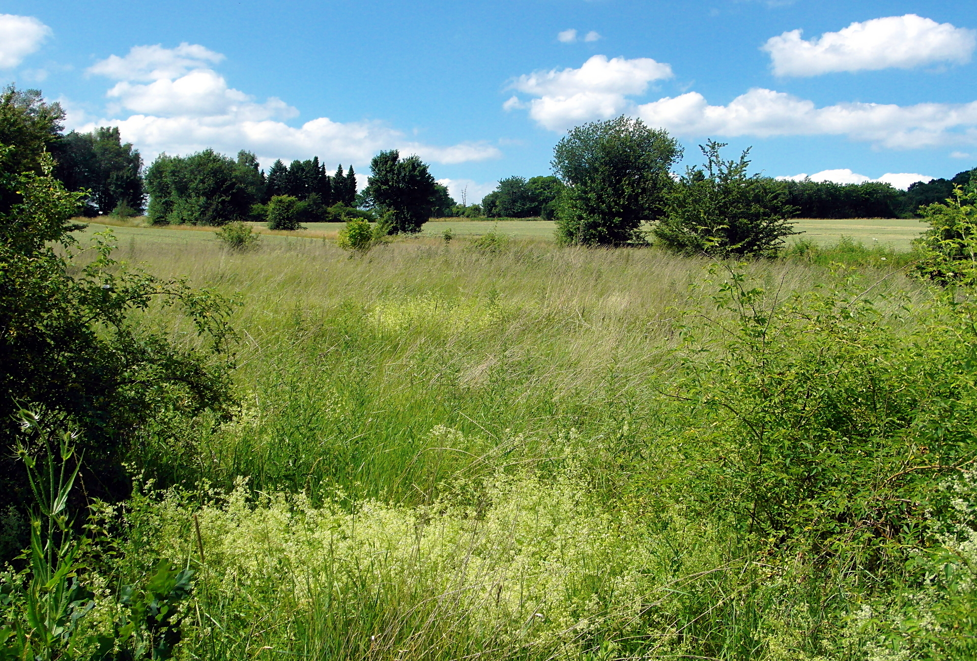 Standort der ehemaligen St.-Annen-Kirche bei Bad Münder am Deister.